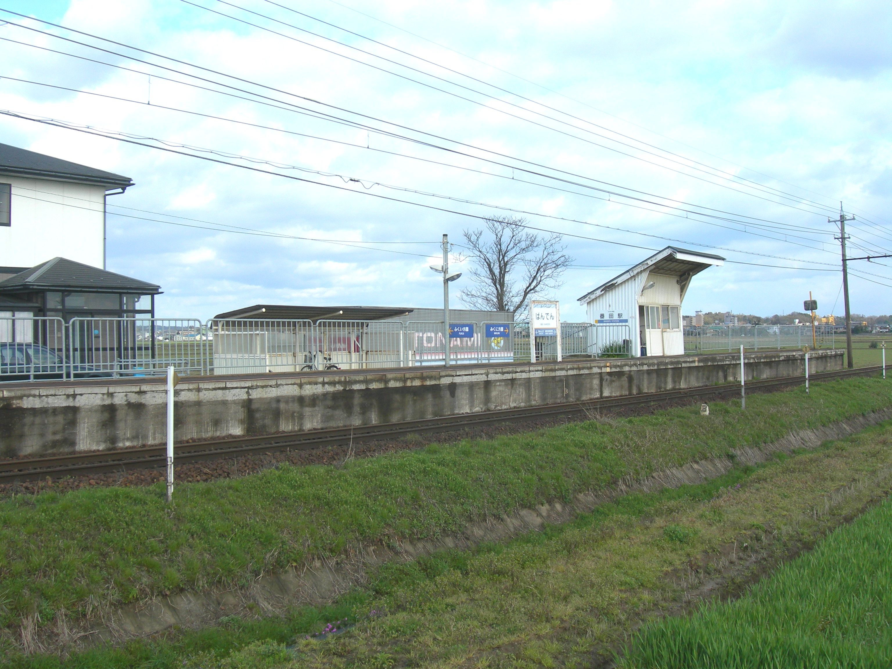 番田駅ホーム